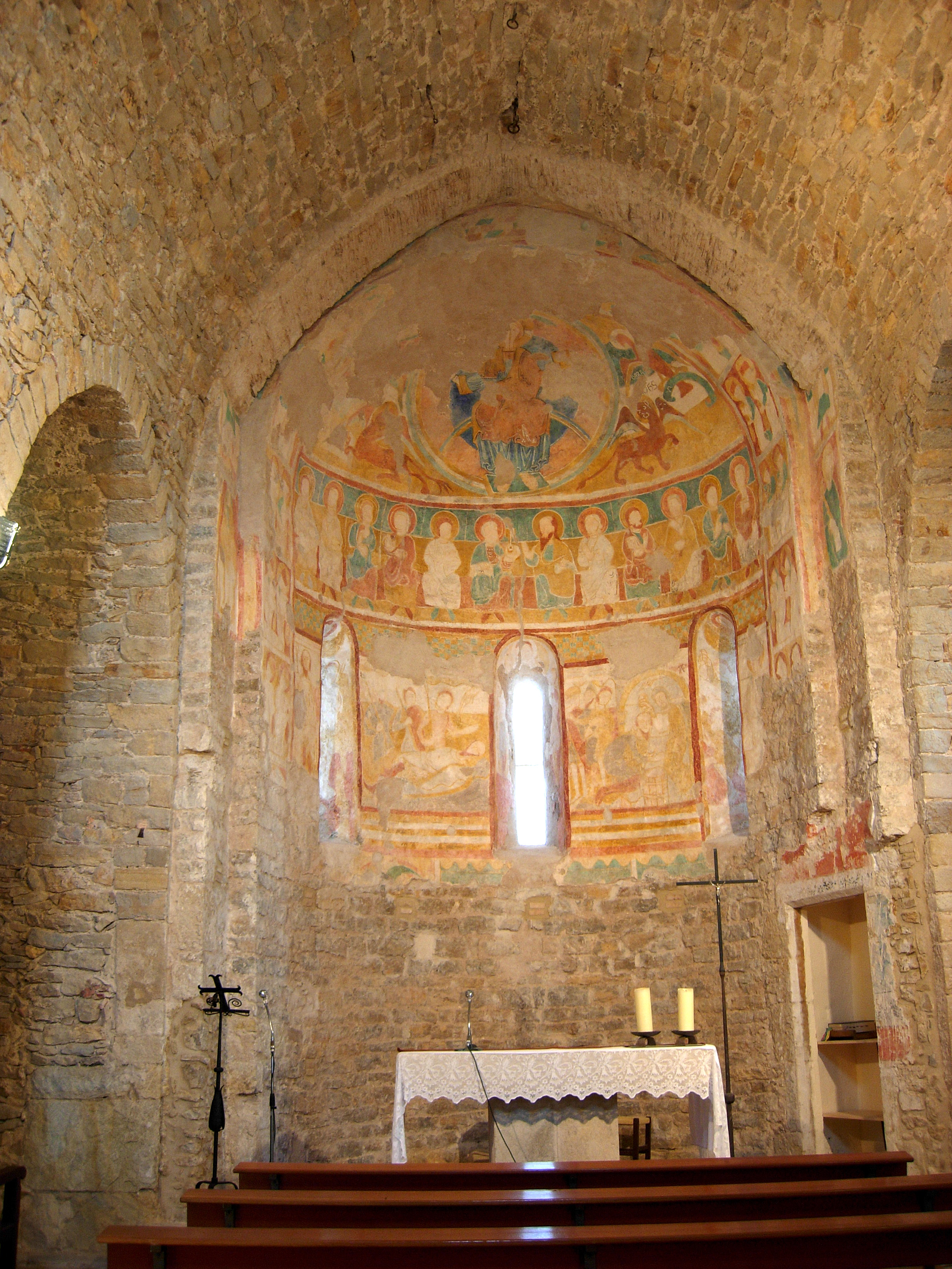 capçalera